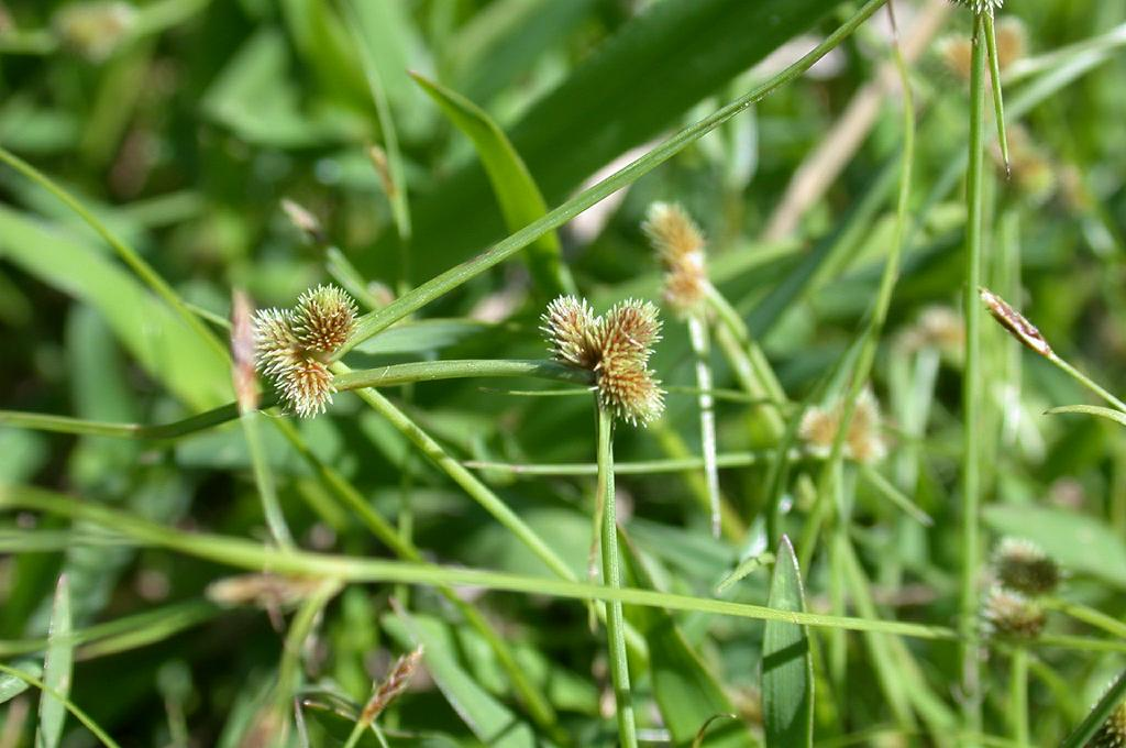 Lipocarpha microcephala (Cyperaceae)：ヒンジガヤツリ Locarity:Tanabe city, Wakayama pref. Japan 和歌山県田辺市 2001,10,01